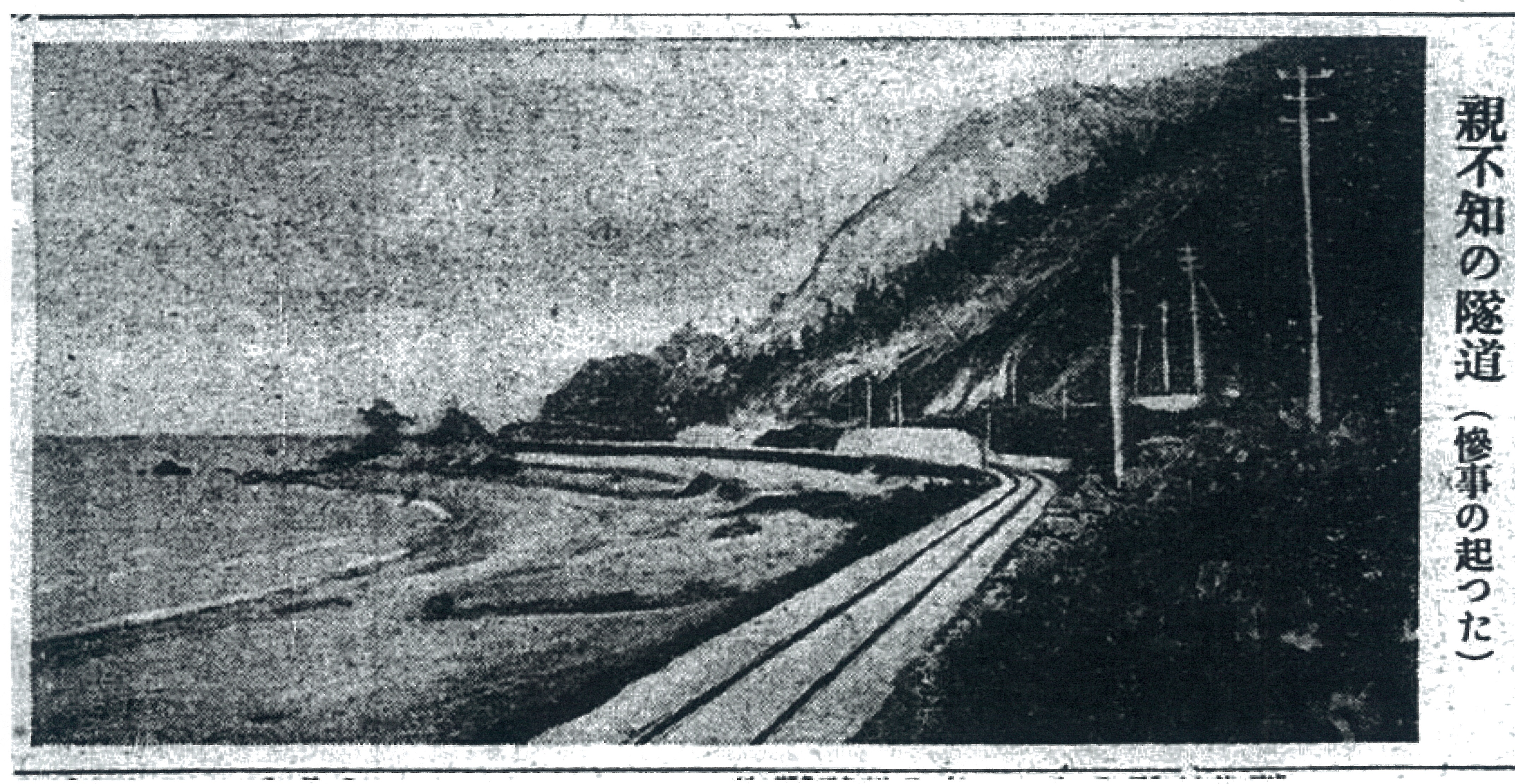 北陸線列車雪崩直撃事故 事故前の現場 東京朝日新聞大正11年2月5日2面